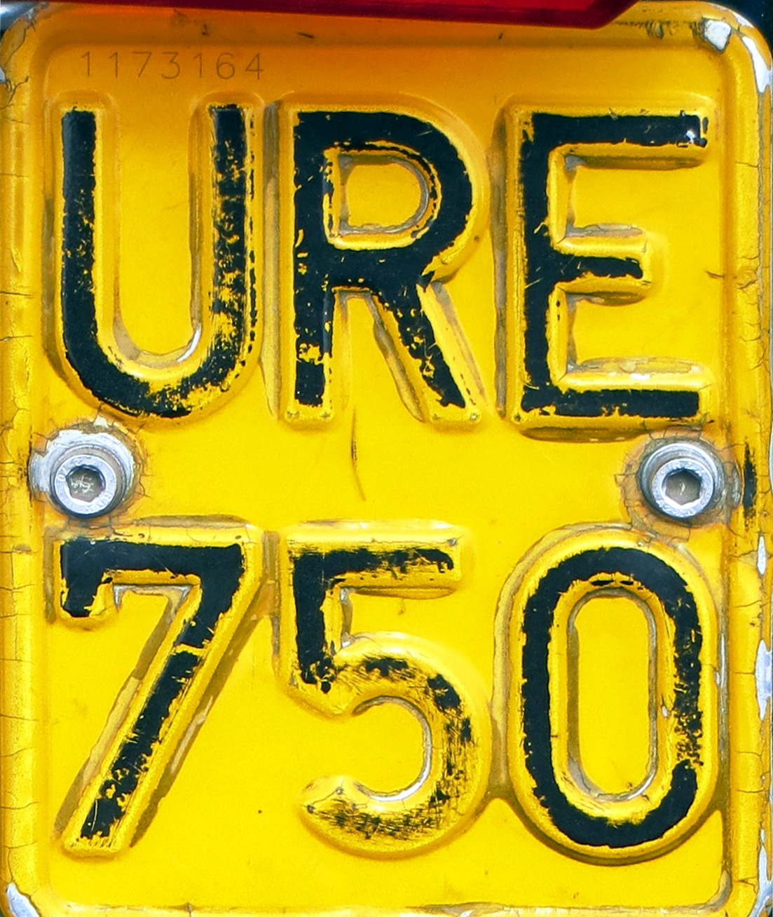 Kentekenplaat uit Cuba